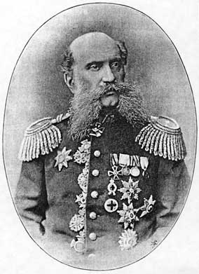 Евге́ний Васи́льевич Богдано́вич (26 февраля (10 марта) 1829 — 1 (14) сентября) 1914, Ялта) — генерал от инфантерии, писатель; портрет 1893 г.